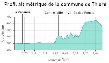 Profil altimétrique de la commune de Thiers avec indications